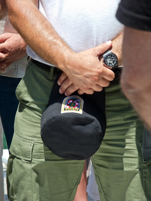 Povorka hrvatskog ponosa i slave; Dan državnosti u Rijeci, Most hrvatskih branitelja iz Domovinskog rata